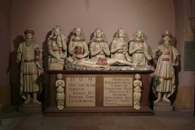 Grab Johann von Luxemburg